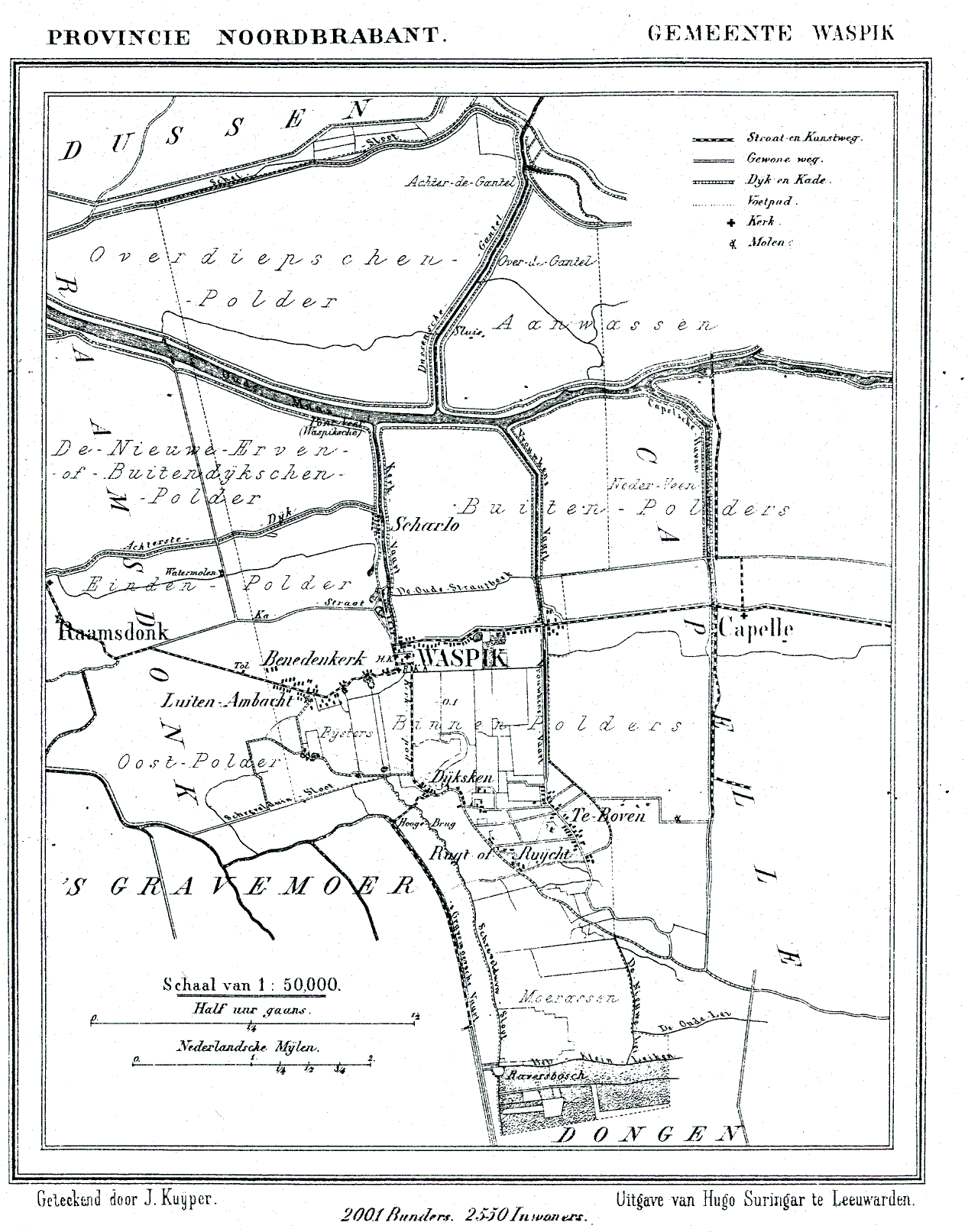 Nederland, Noord-Brabant, Gemeente Waspik